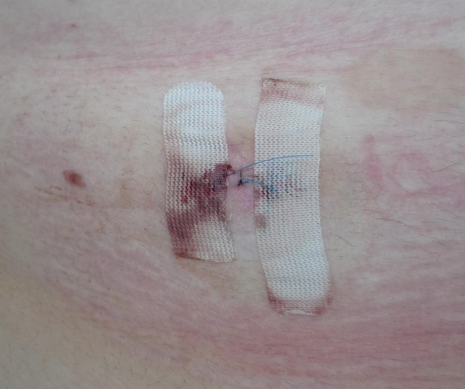 Nach Entferung eines Leberflecks. Durchmesser des Leberflecks ca. 6mm